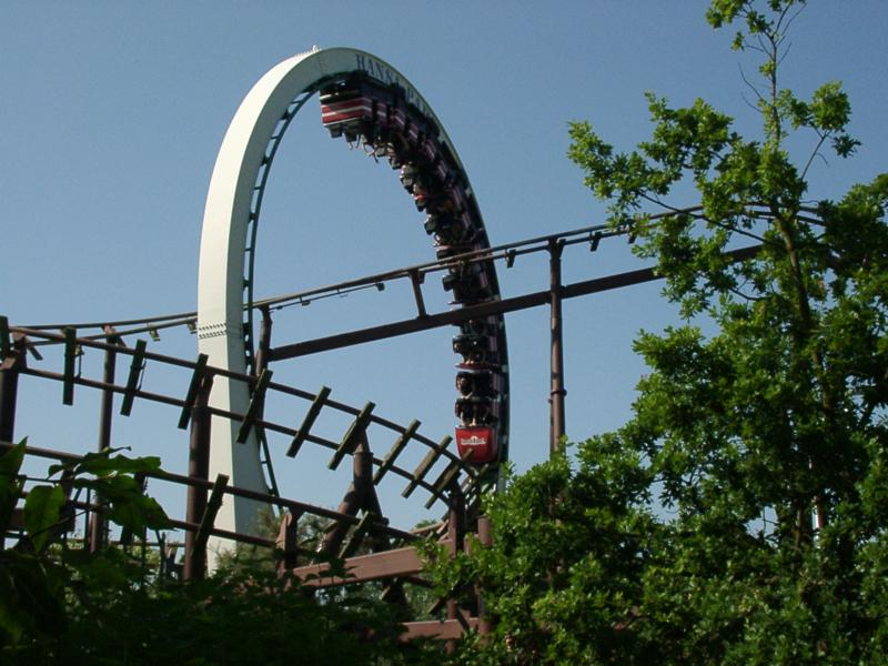 Hansa-Park Loopingbahn (Nessie Superrollercoaster)